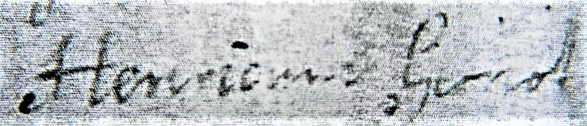 Änderung der Schreibweise des Namens Gernot zu Gernert in eine Gerichtsurkunde